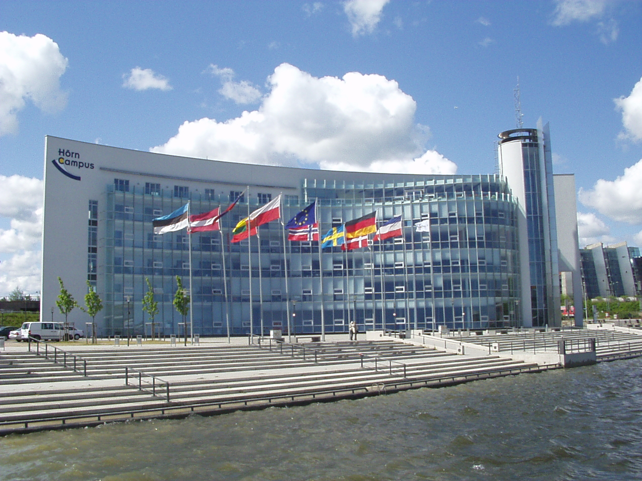 Hörn Campus in Kiel